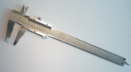 Schuifmaat - eigen foto (dit moet hem zijn) - PD